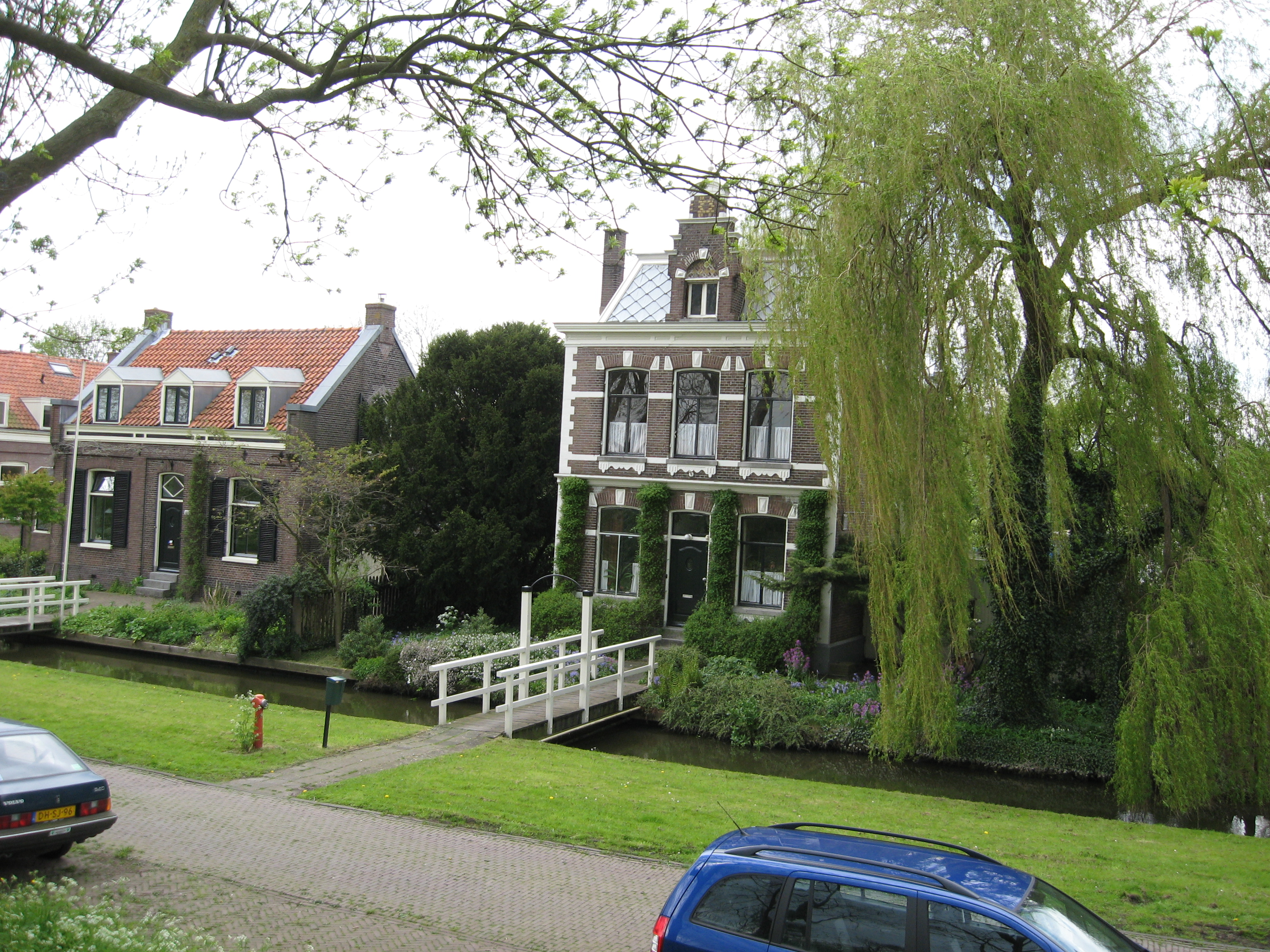 Schellingwoude